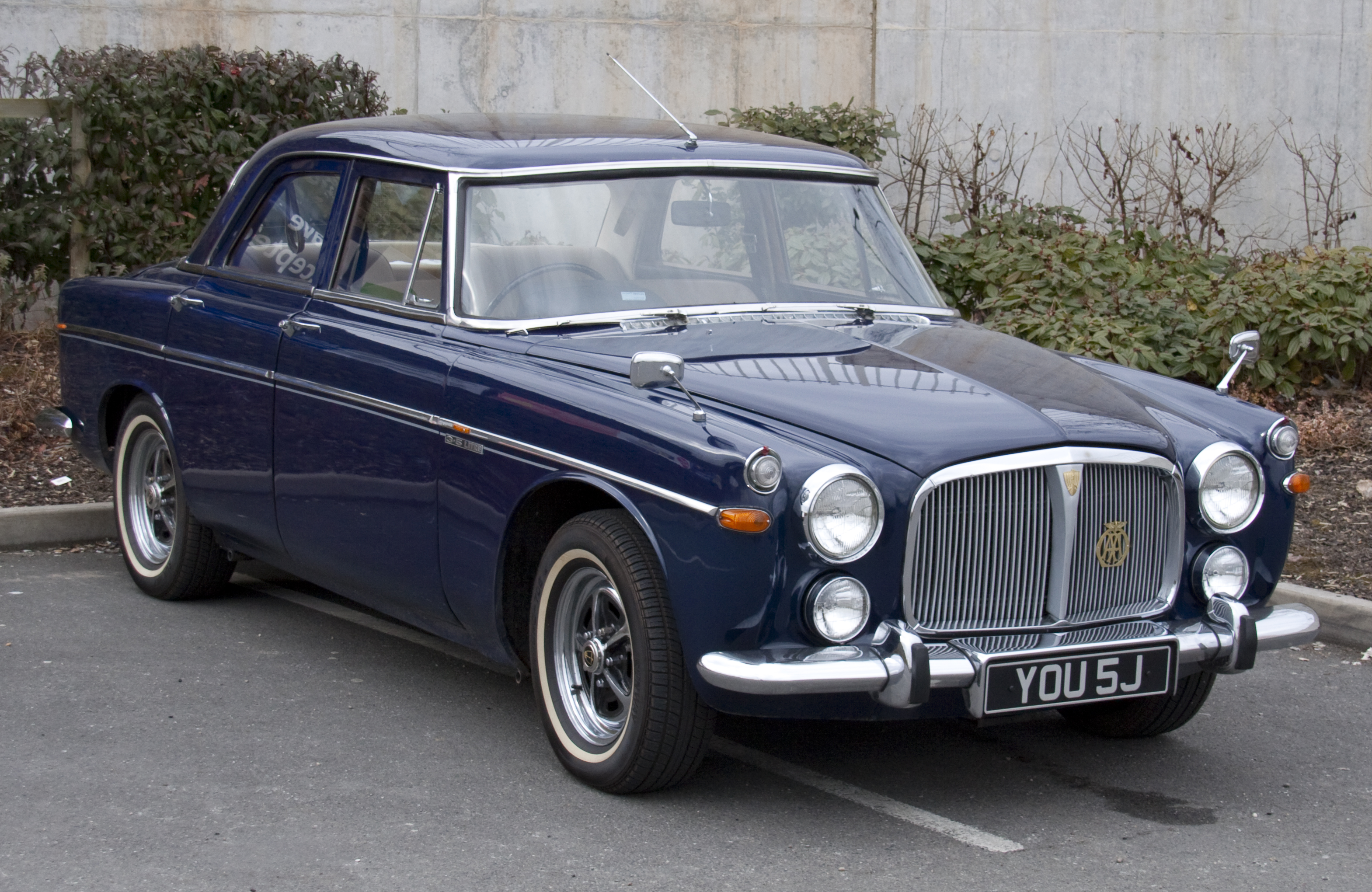 Rover P5 3.5litre 2